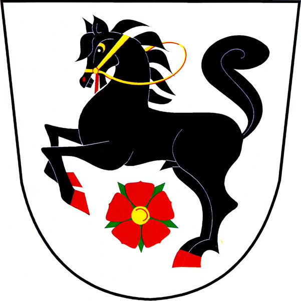 Znak obce Újezd u Rosic